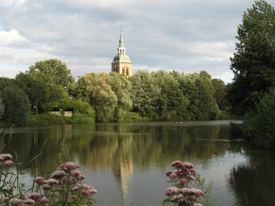 Emsradweg, Rheda-Wiedenbrück, Emssee mit St.Aegidiuskirche